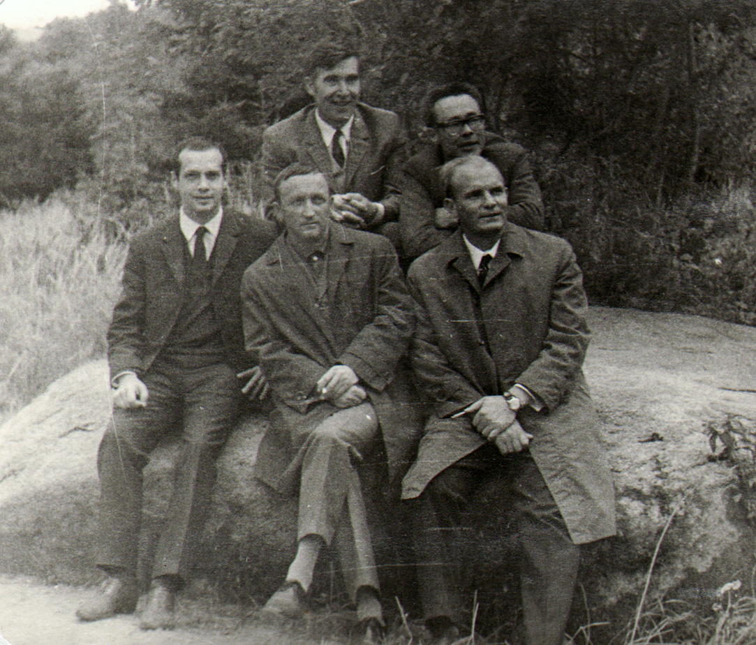 България, Витоша. Борис Паригин (в центъра) с български учени. 1970.